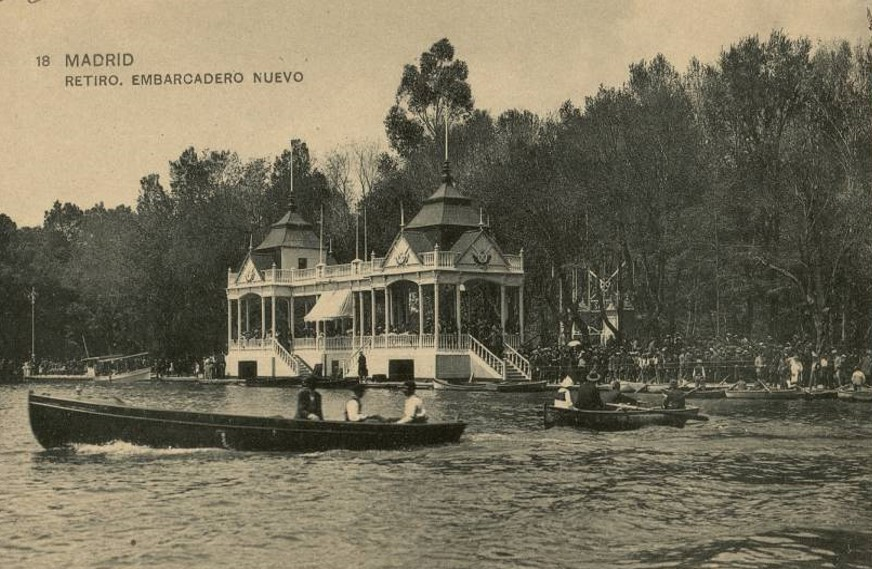 Tarjeta postal titulada "Retiro. Embarcadero nuevo". Entre 1920 y 1925. Cartulina blanco y negro (9 x 14 cm). Museo de Historia de Madrid (inventariado con el número 31257). Puede verse el embarcadero edificado en 1917 en el Estanque Grande del Parque del Retiro (Madrid, España) y desaparecido en un incendio en 1920. En 1926 el arquitecto Luis Bellido construyó otro embarcadero, que se conserva en la actualidad.